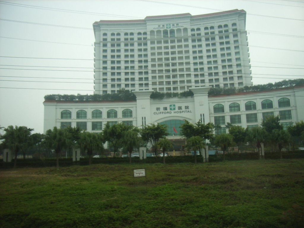 Guangdong Panyu Clifford Estate, China.